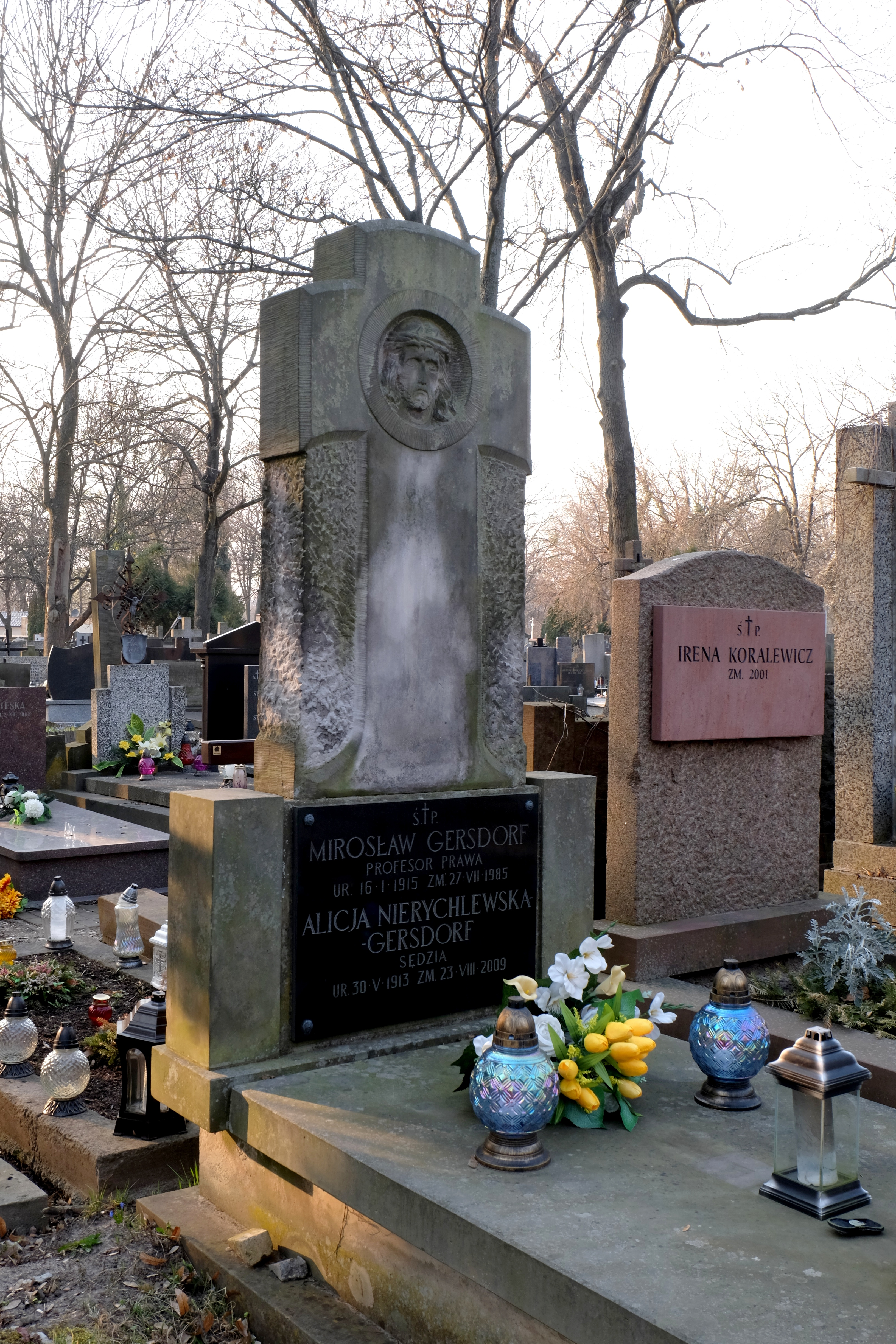 Grób prof. Mirosława Gersdorfa i sędzi Alicji Nierychlewskiej-Gersdorf na Cmentarzu Powązkowskim w Warszawie